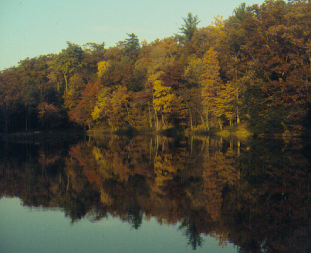 Doubling Gap Lake at Colonel Denning State Park